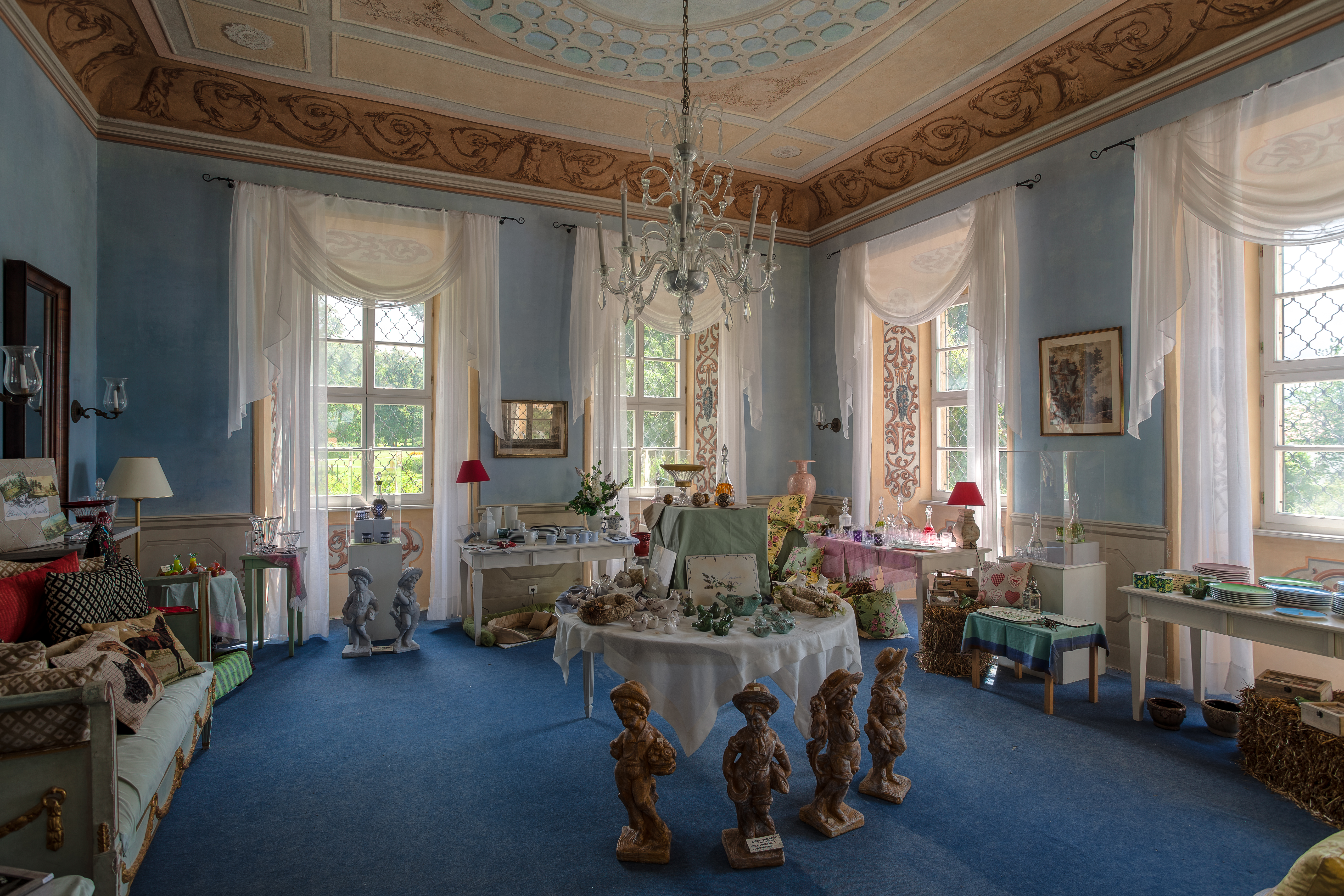 Łomnica, ul. Karpnicka 3 - sala pałacowa (zabytek nr 653/J)